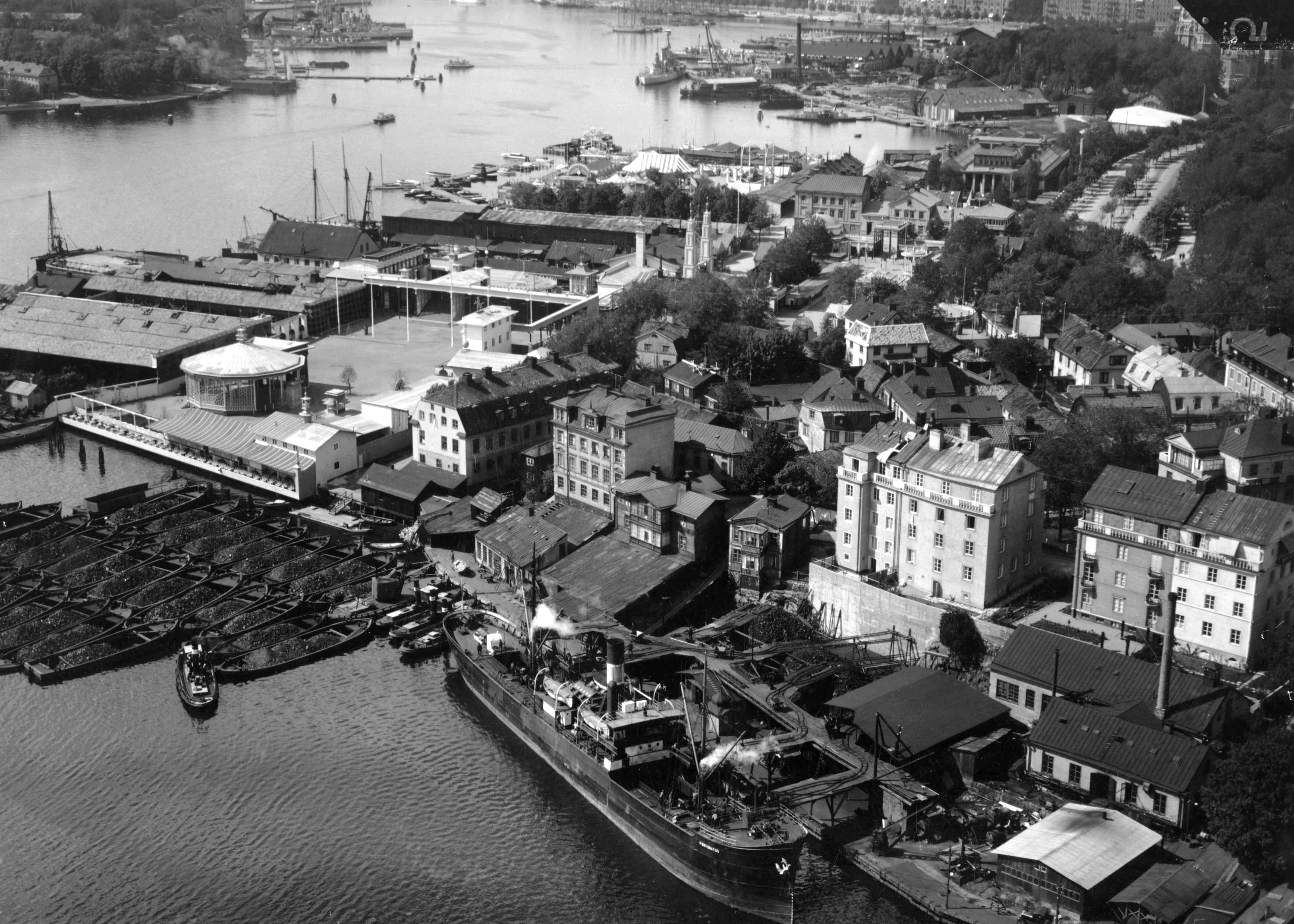 Djurgårdsvarvet. Djurgårdsvarvet startade sin verksamhet 1735 och här byggdes båtar fram till 1979.